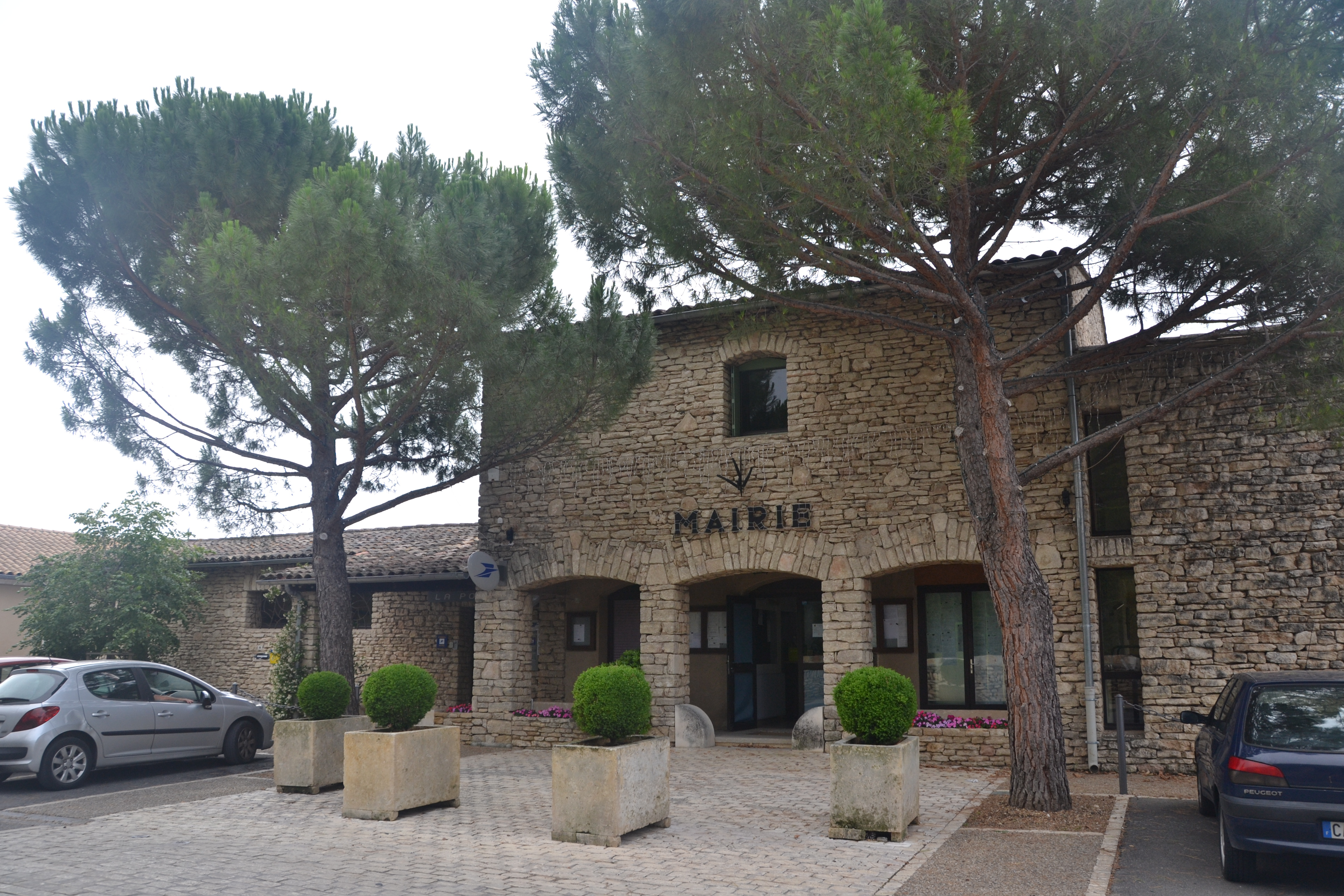 Mairie de Cabrières